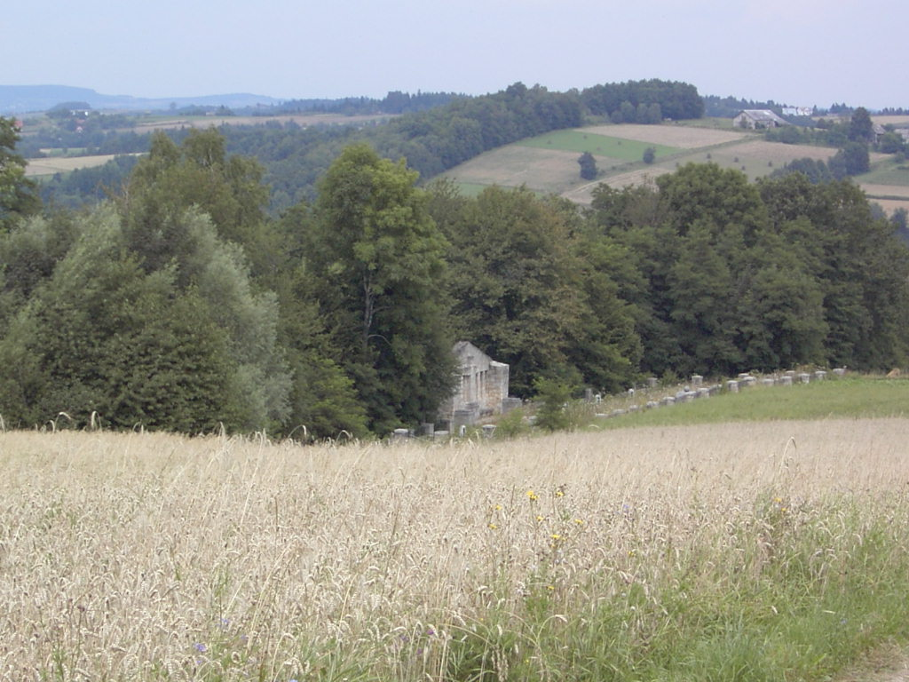 Cmentarz wojenny nr 116 w Staszkówce-Dawidówce